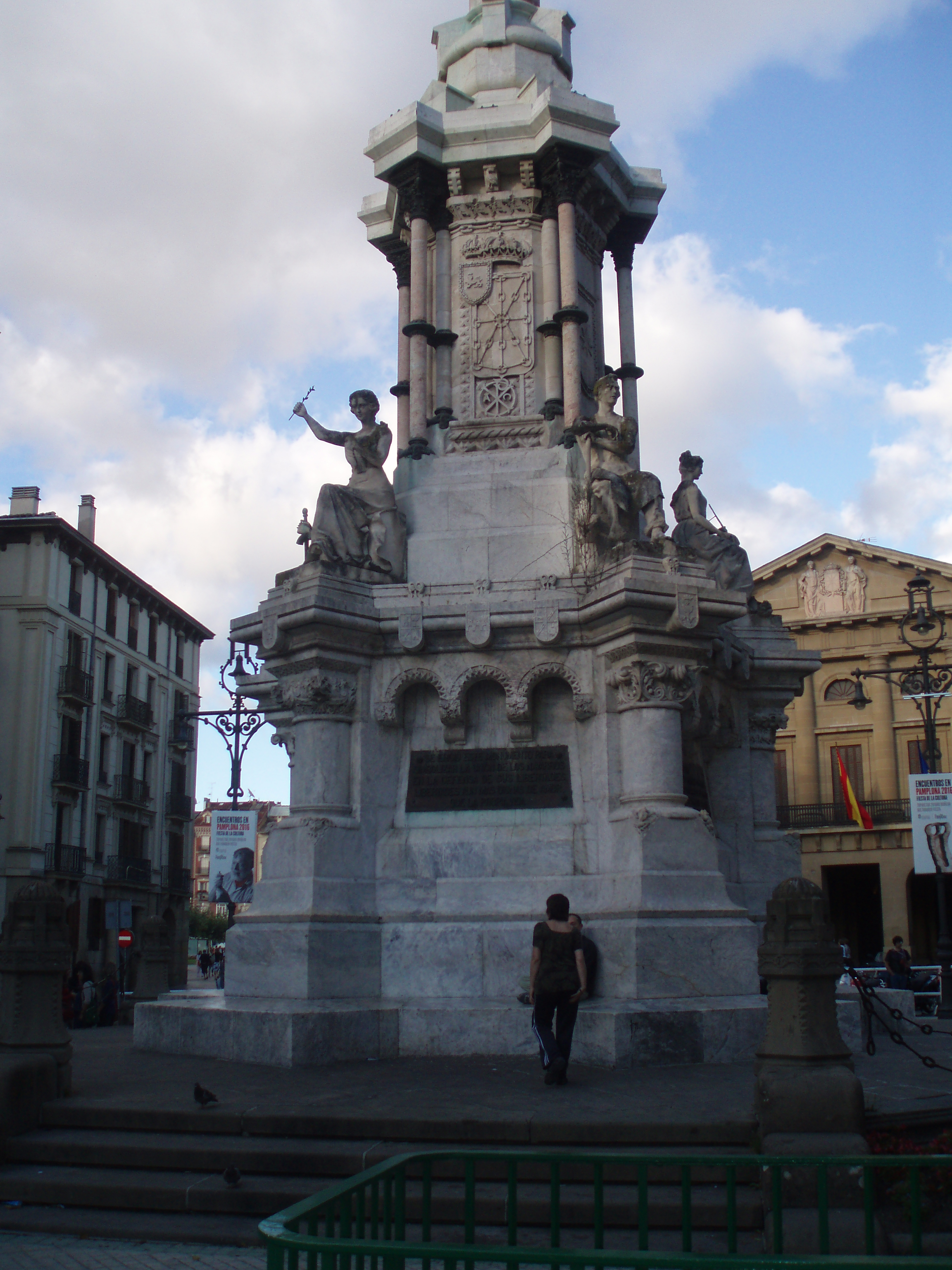 Monumento a los Fueros de Navarra en Pamplona. Navarra, (España).